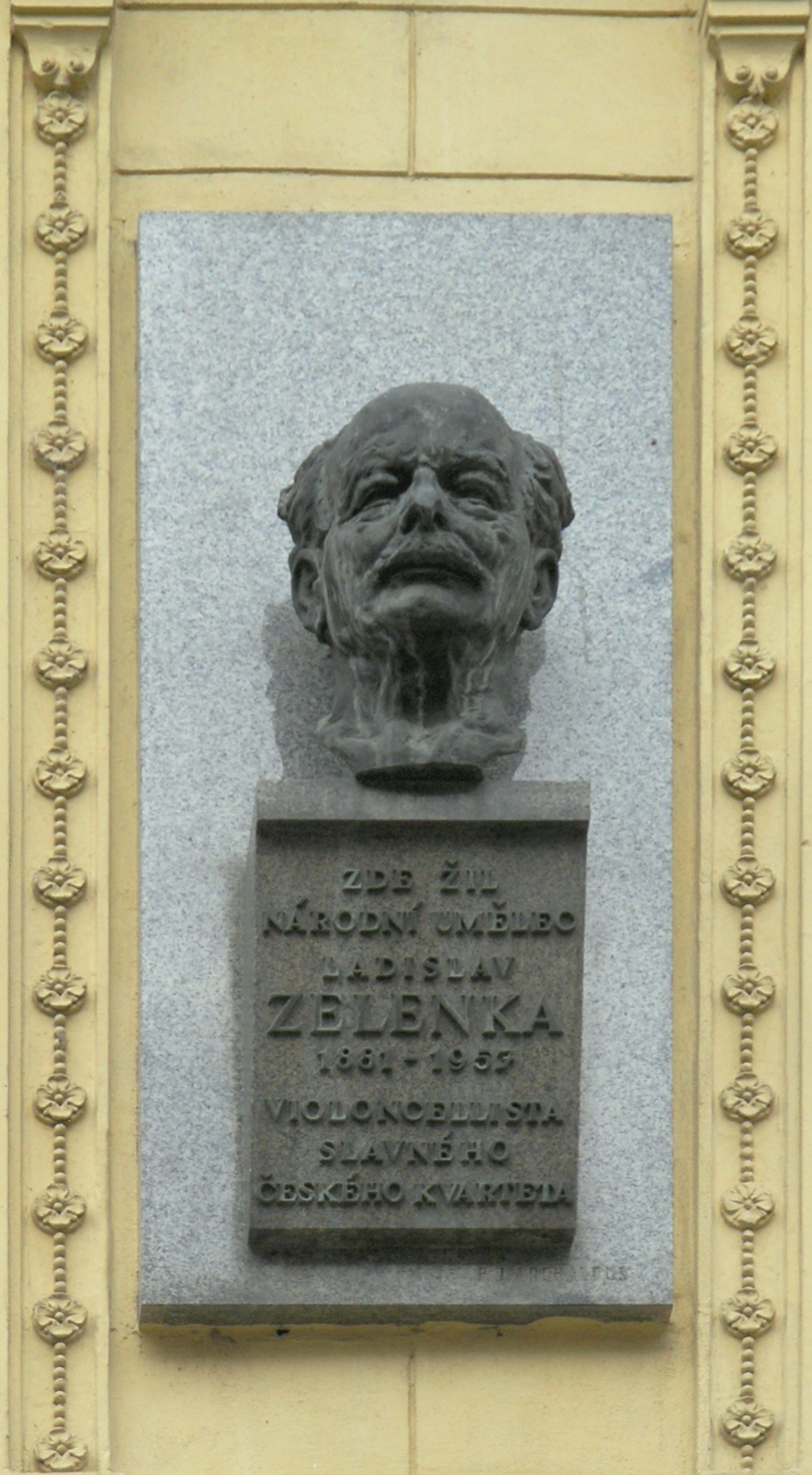 Praha, Malá Strana - Mostecká 16 (busta Ladislava Zelenky)